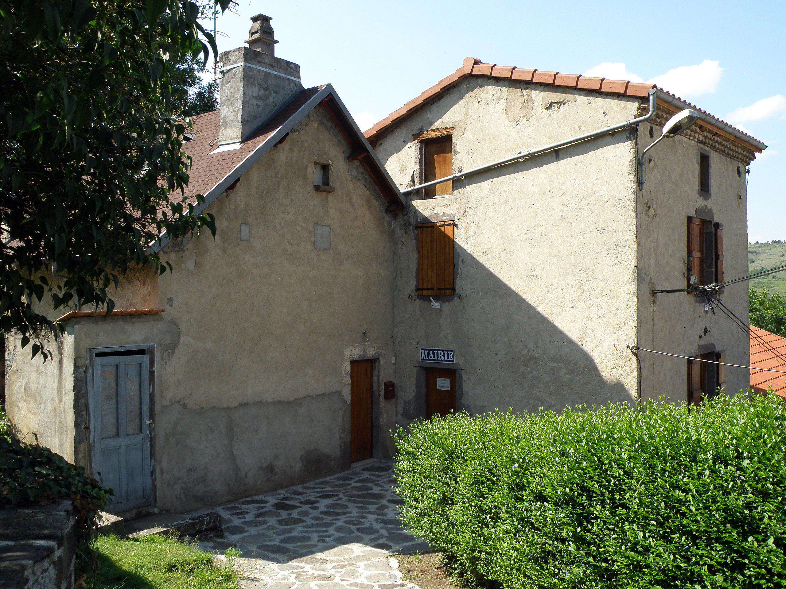 Grandeyrolles, comm. du Puy-de-Dôme (Auvergne, France). Mairie.